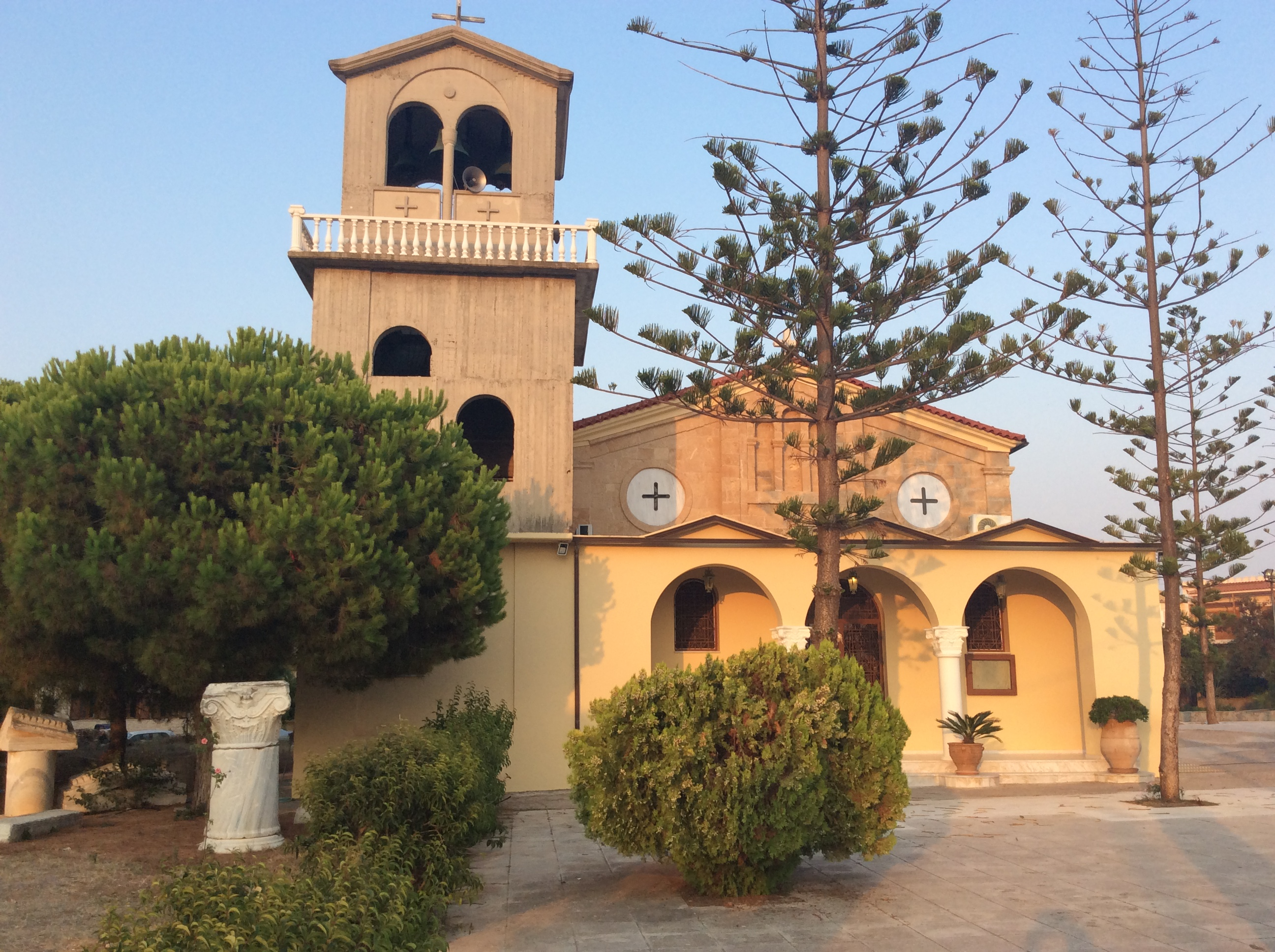 Μαραθόπολη. O Ιερός Ναός Μεταμορφώσεως του Σωτήρος.